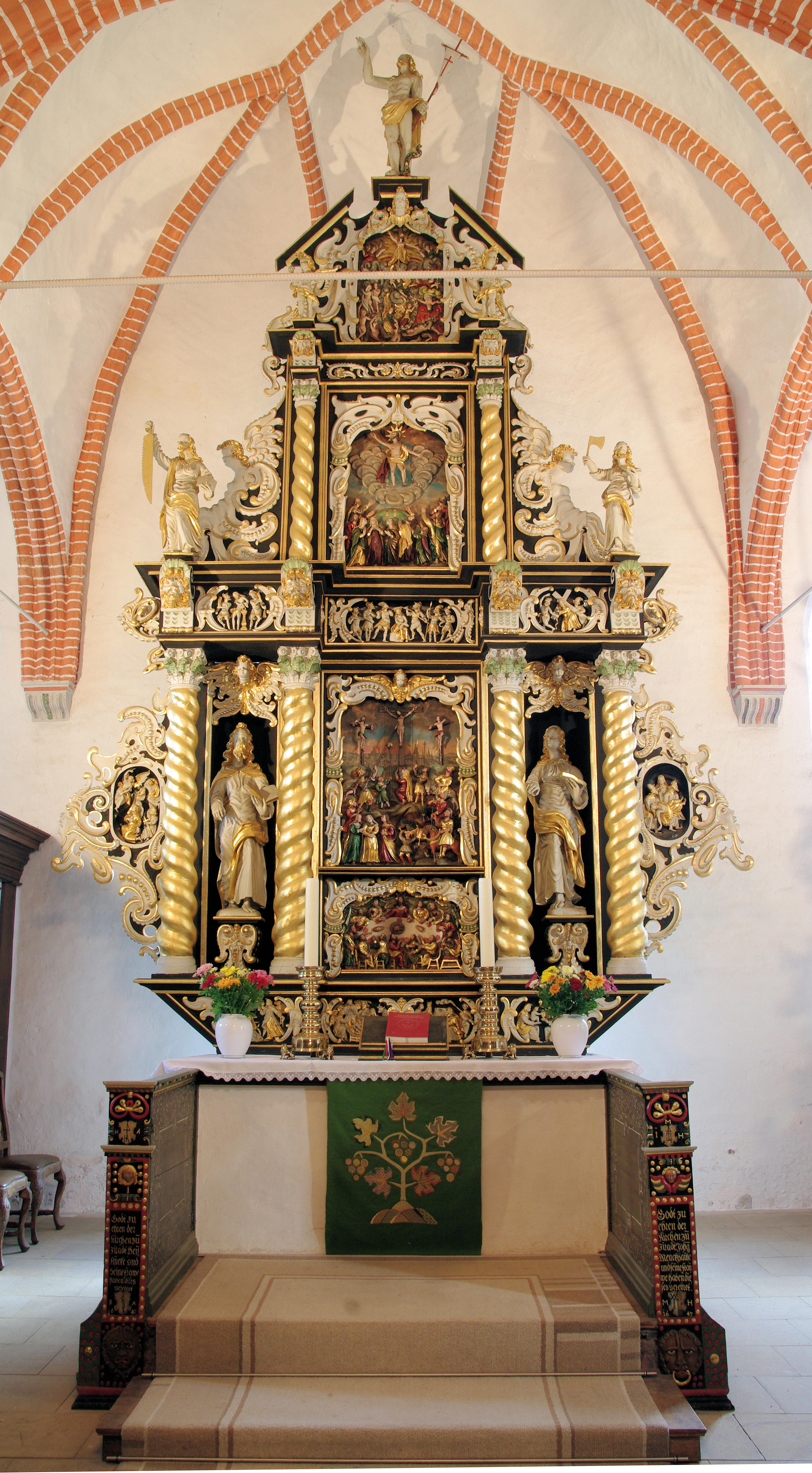 Der Baeockalter